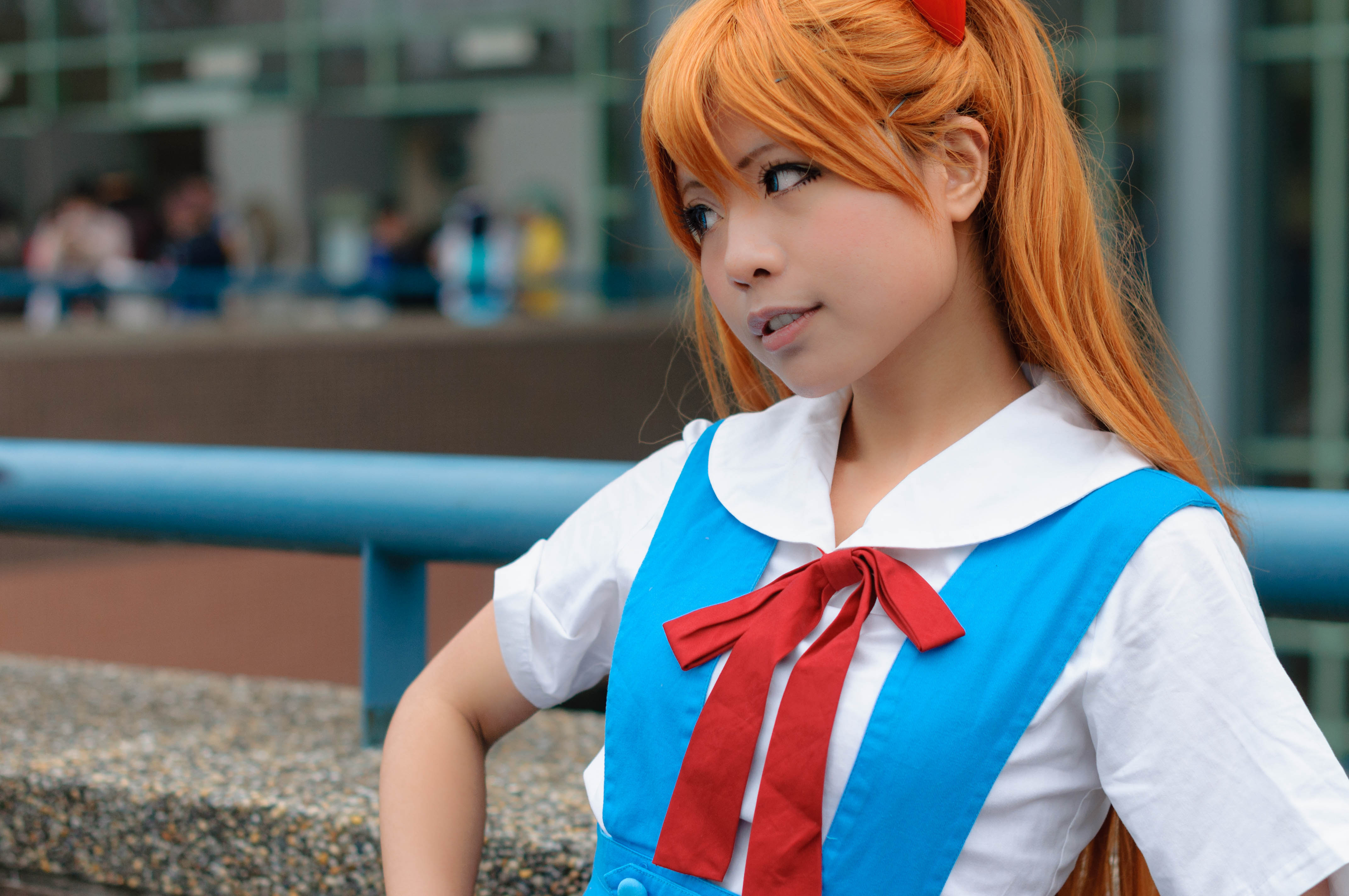 第39屆台灣同人誌販售會，《新世紀福音戰士》惣流·明日香·蘭格雷cosplayer。